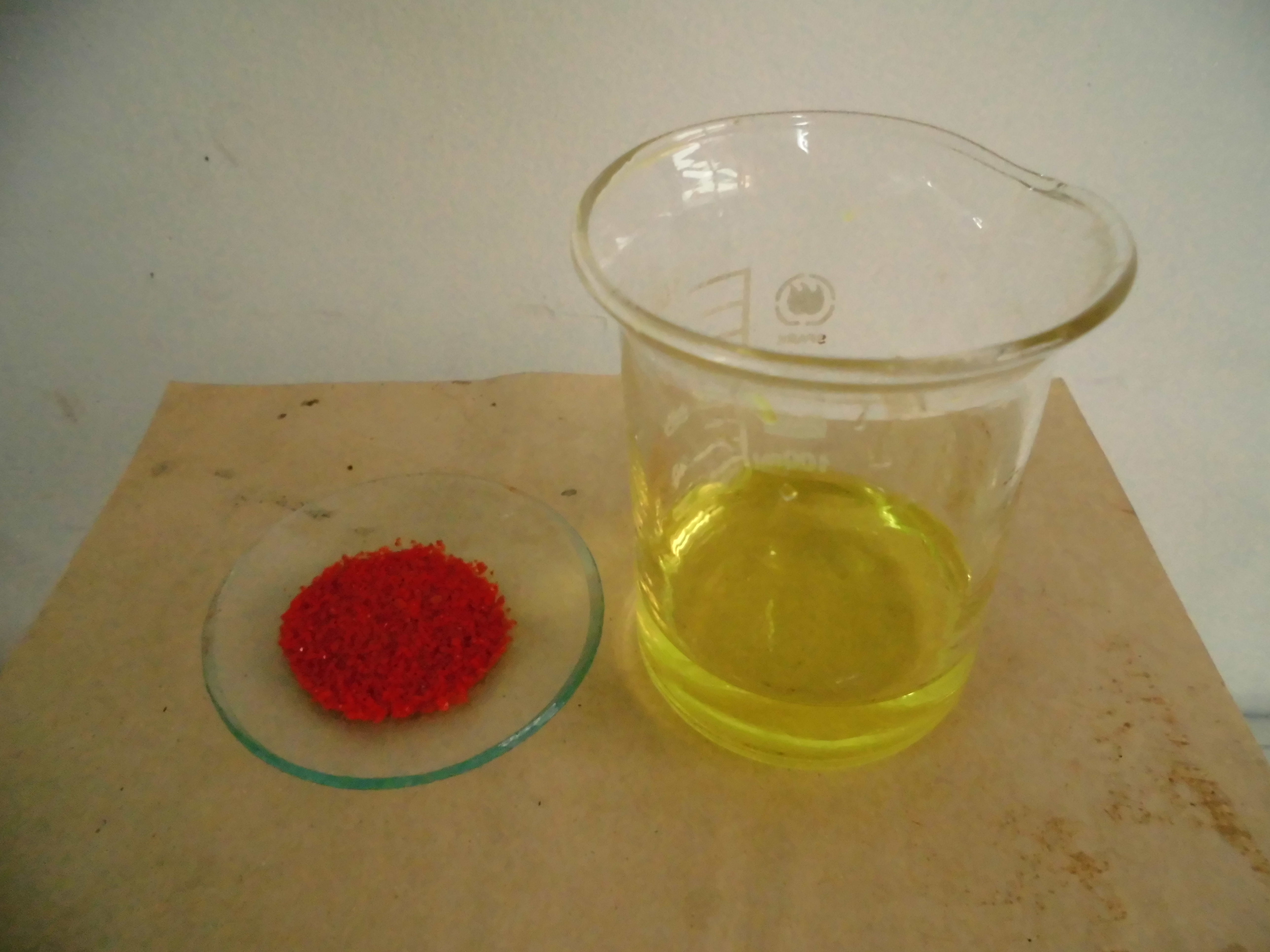 六氰合铁(III)酸钾和它的溶液。